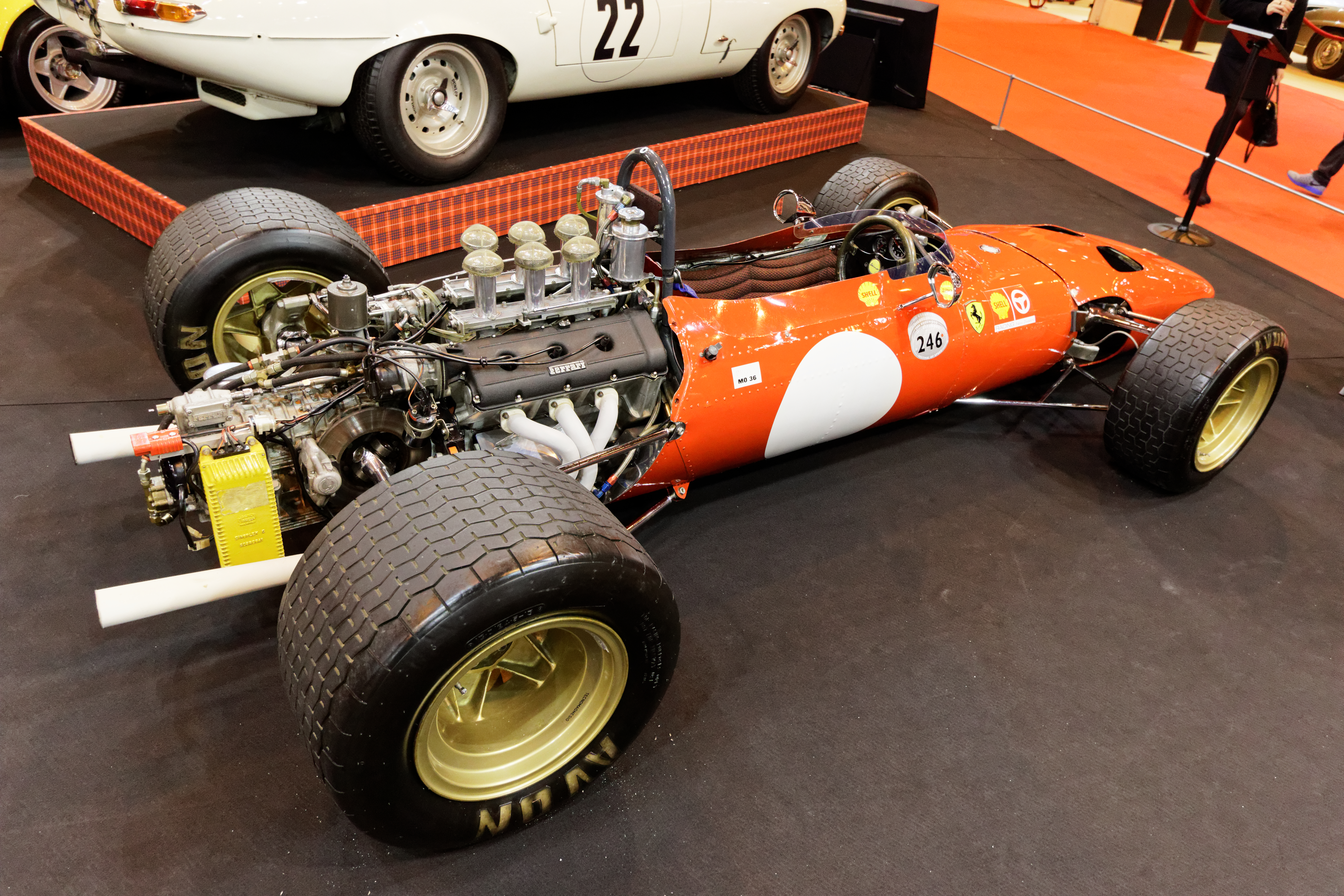 Une Ferrari Dino 166-246 Tasman F2 de 1968 exposée lors du salon Rétromobile 2016.